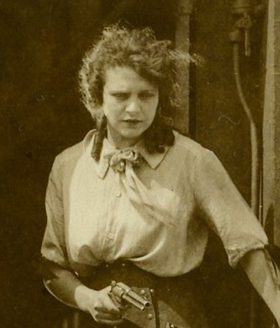 Helen Gibson circa 1920